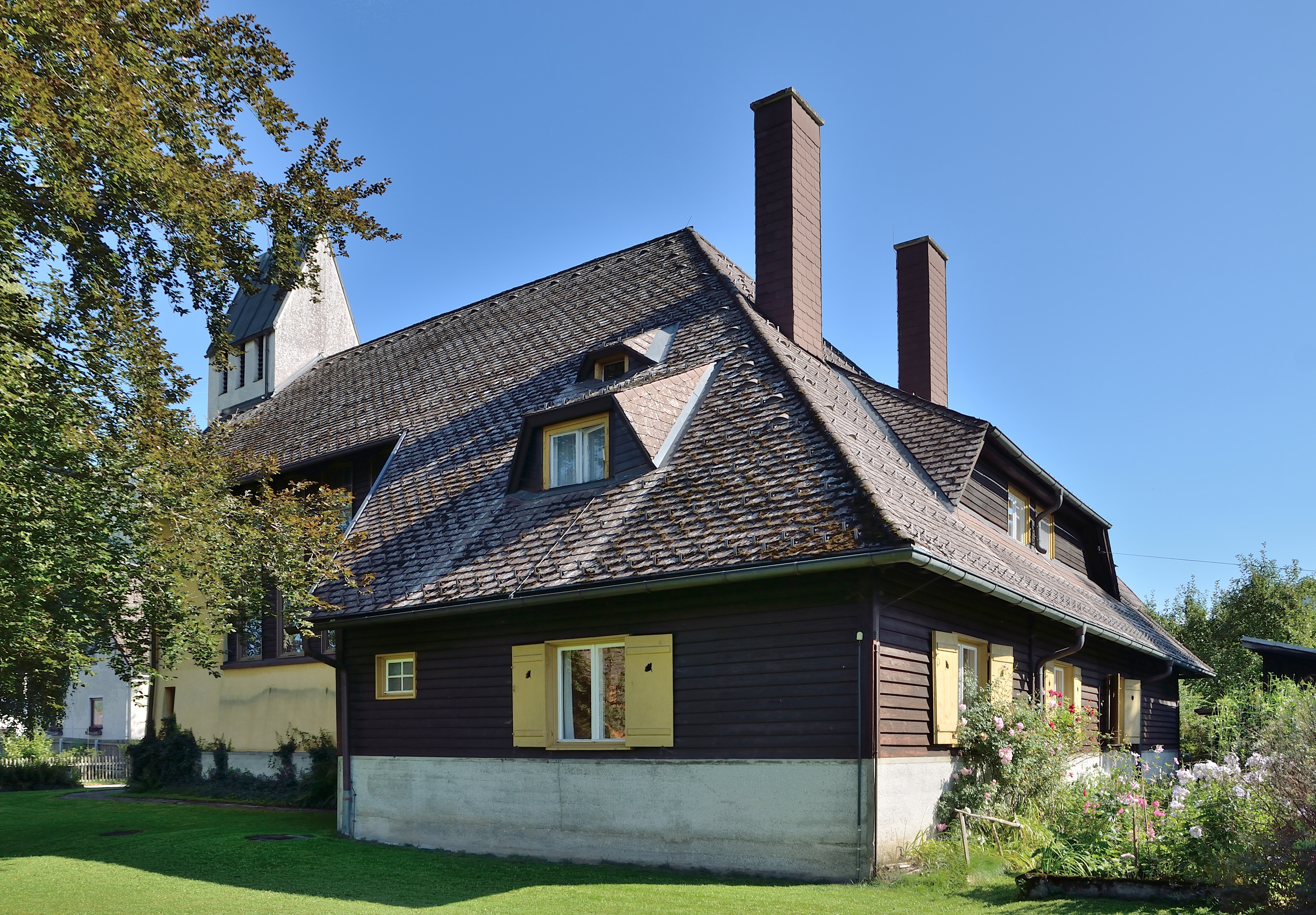 Evang. Pfarrkirche A.B. Admont, Steiermark. Von Nordwesten, hinten in Baueinheit ein Wohnhaus (das Pfarrhaus?).